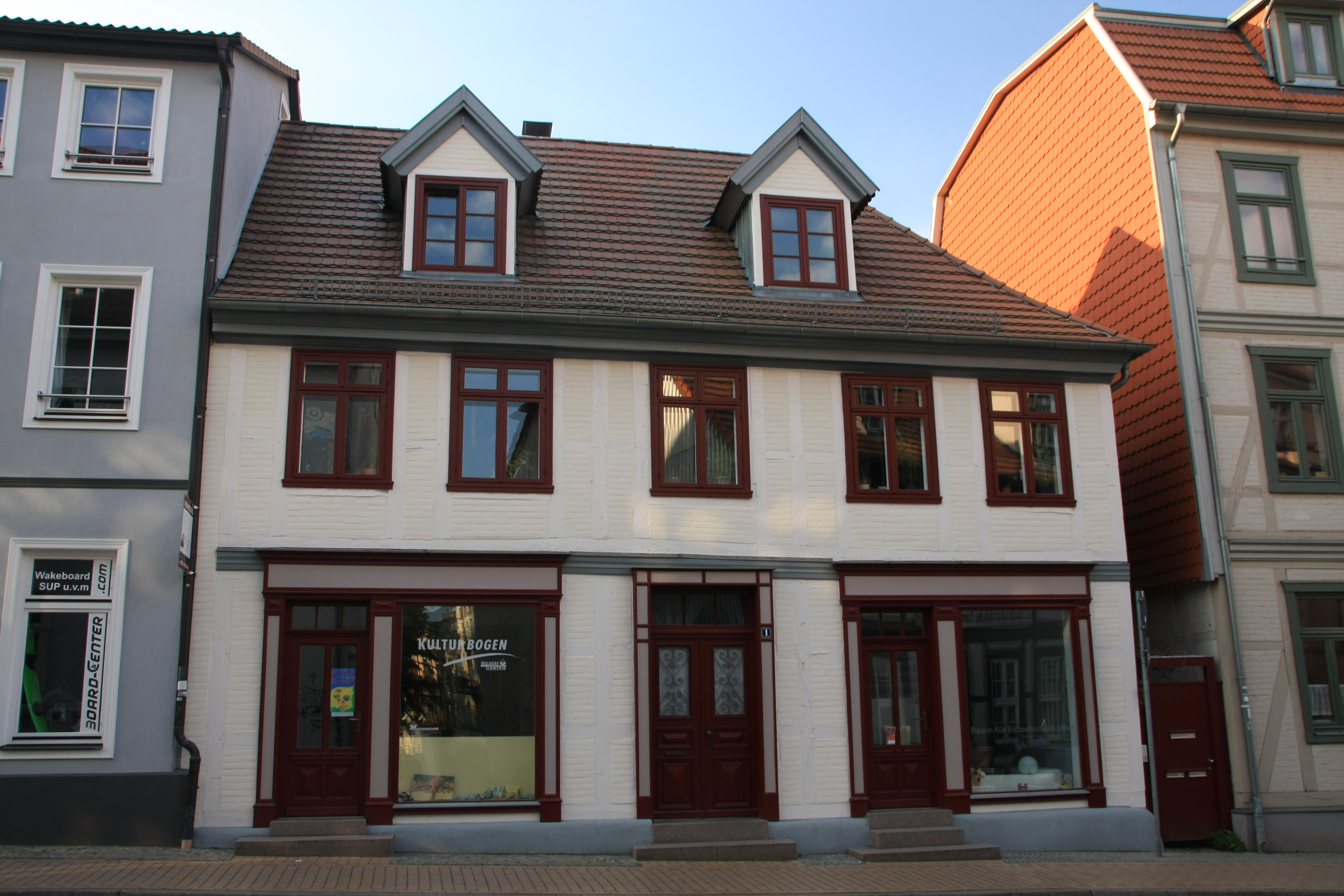 19055 Schwerin, Münzstraße 1